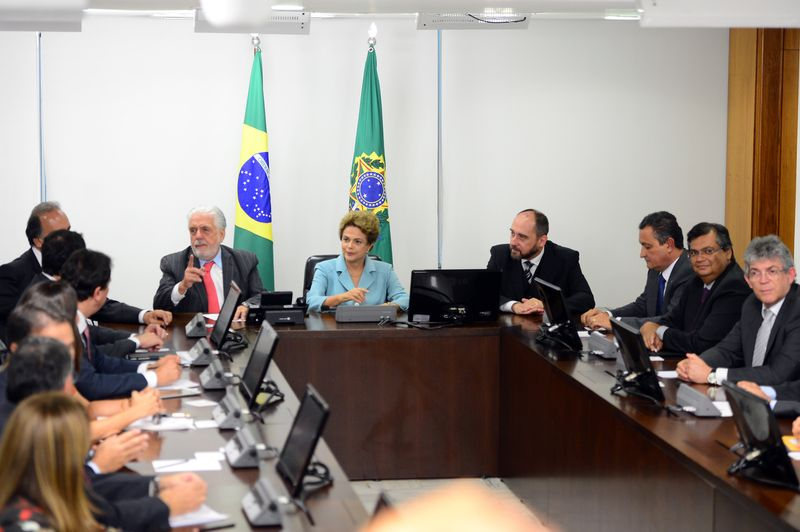 Dilma reúne-se com governadores contrários ao impeachment.